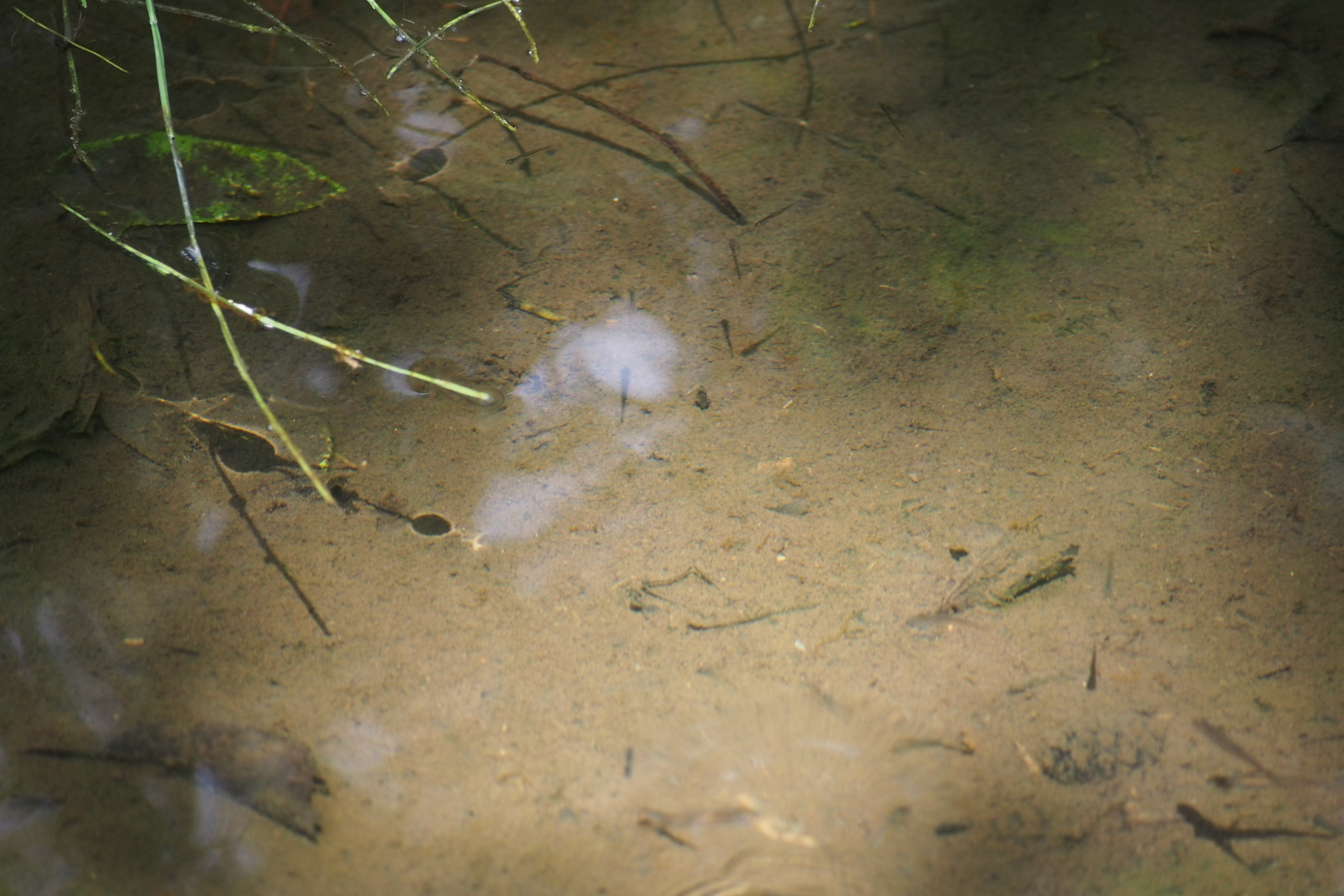 ミナミメダカ Oryzias latipes or キタノメダカ Oryzias sakaizumii.